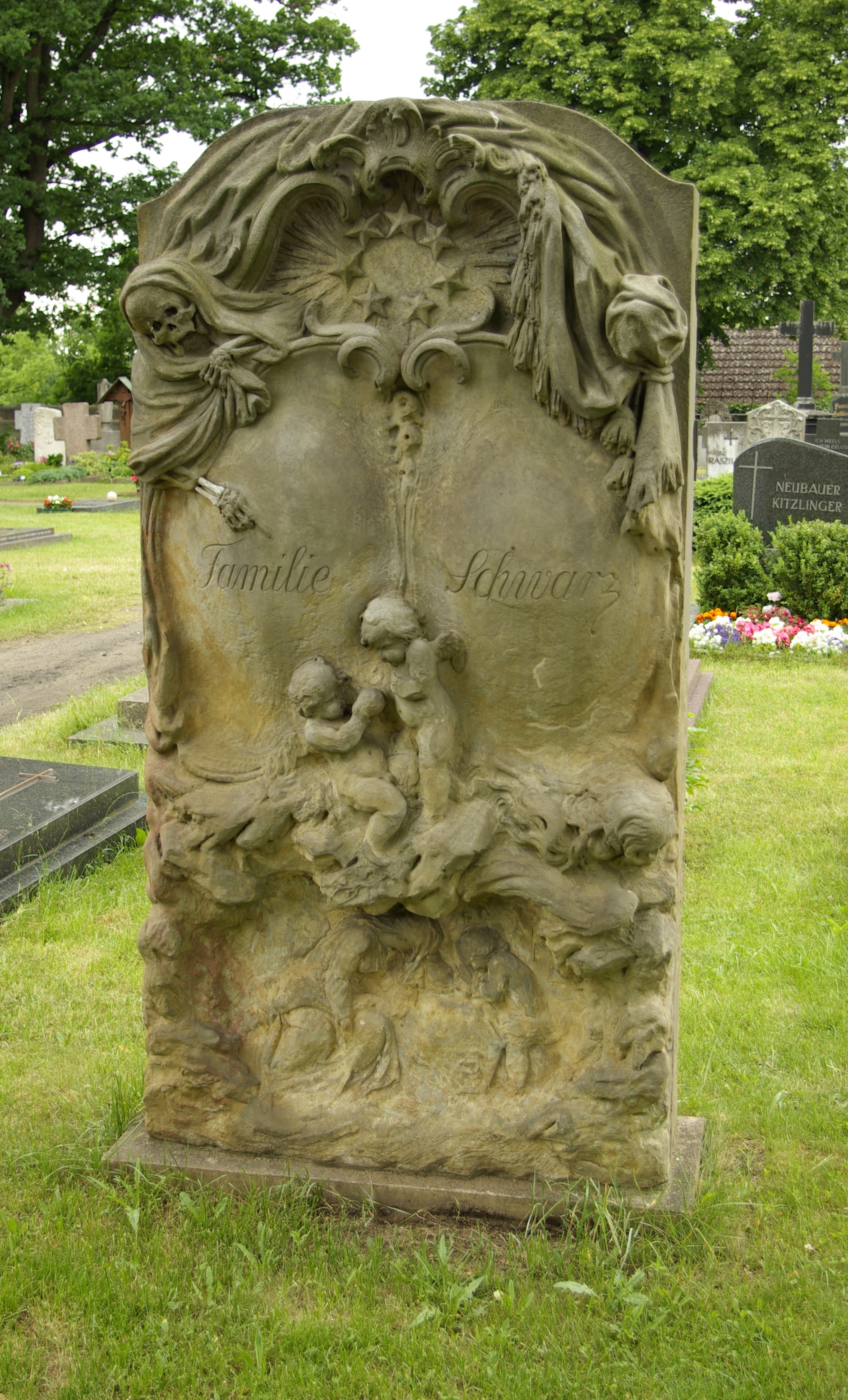 Ehemalige Gruftabdeckung (18. Jahrhundert), später als Stele wiederverwendet, auf dem Neustädter Friedhof in Erlangen